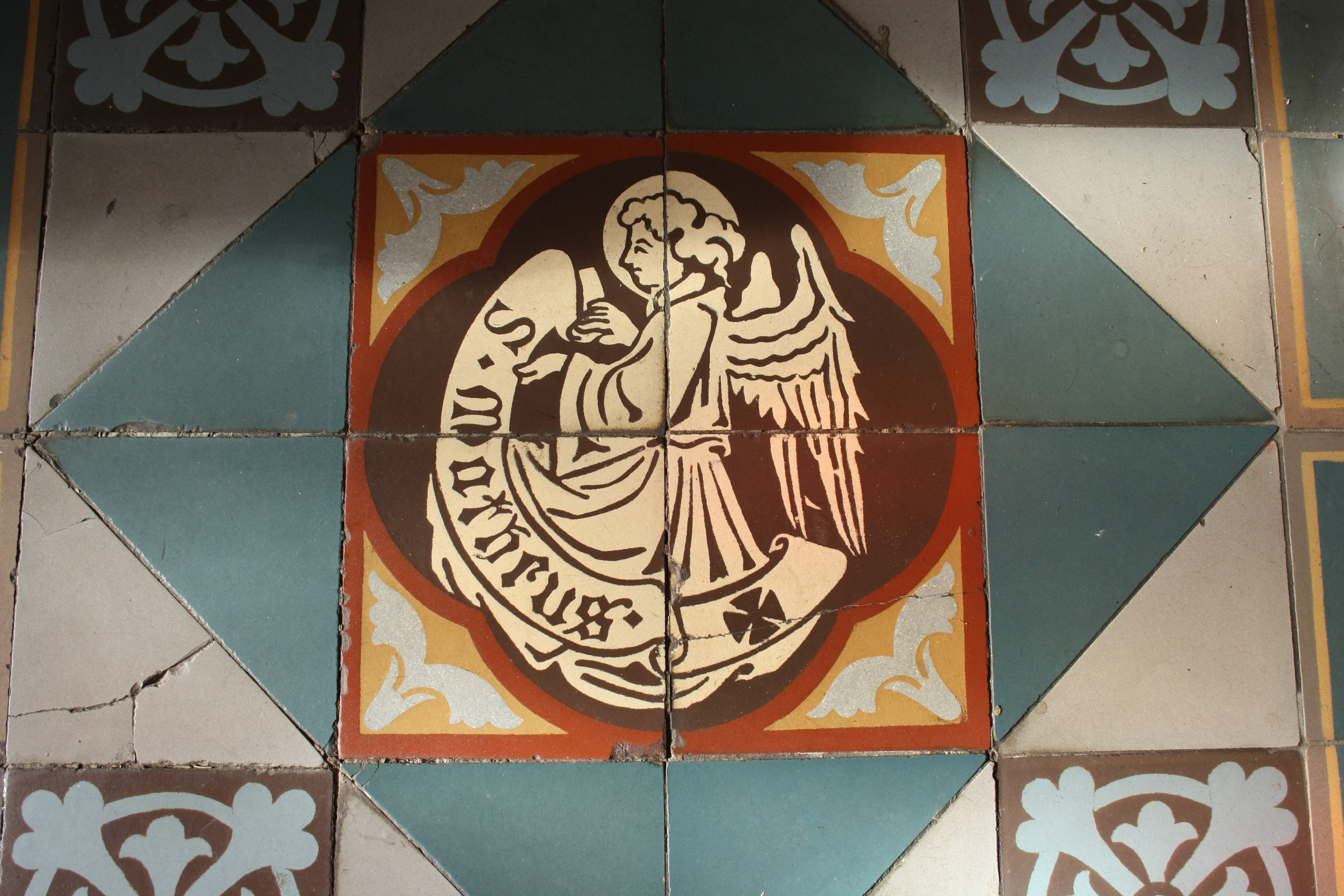 Bodenfliese im Chor der katholischen Pfarrkirche St. Nikolaus in Aremberg, Darstellung: Evangelist Mathäus